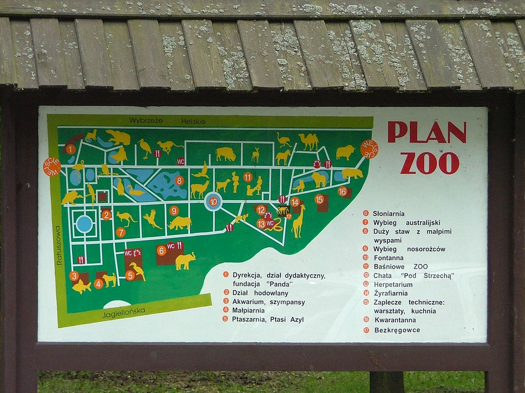 Warsaw zoo